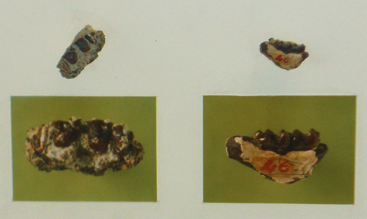 Fossil of Diacodexis, an extinct mammal -- Took the photo at Natural History Museum, London